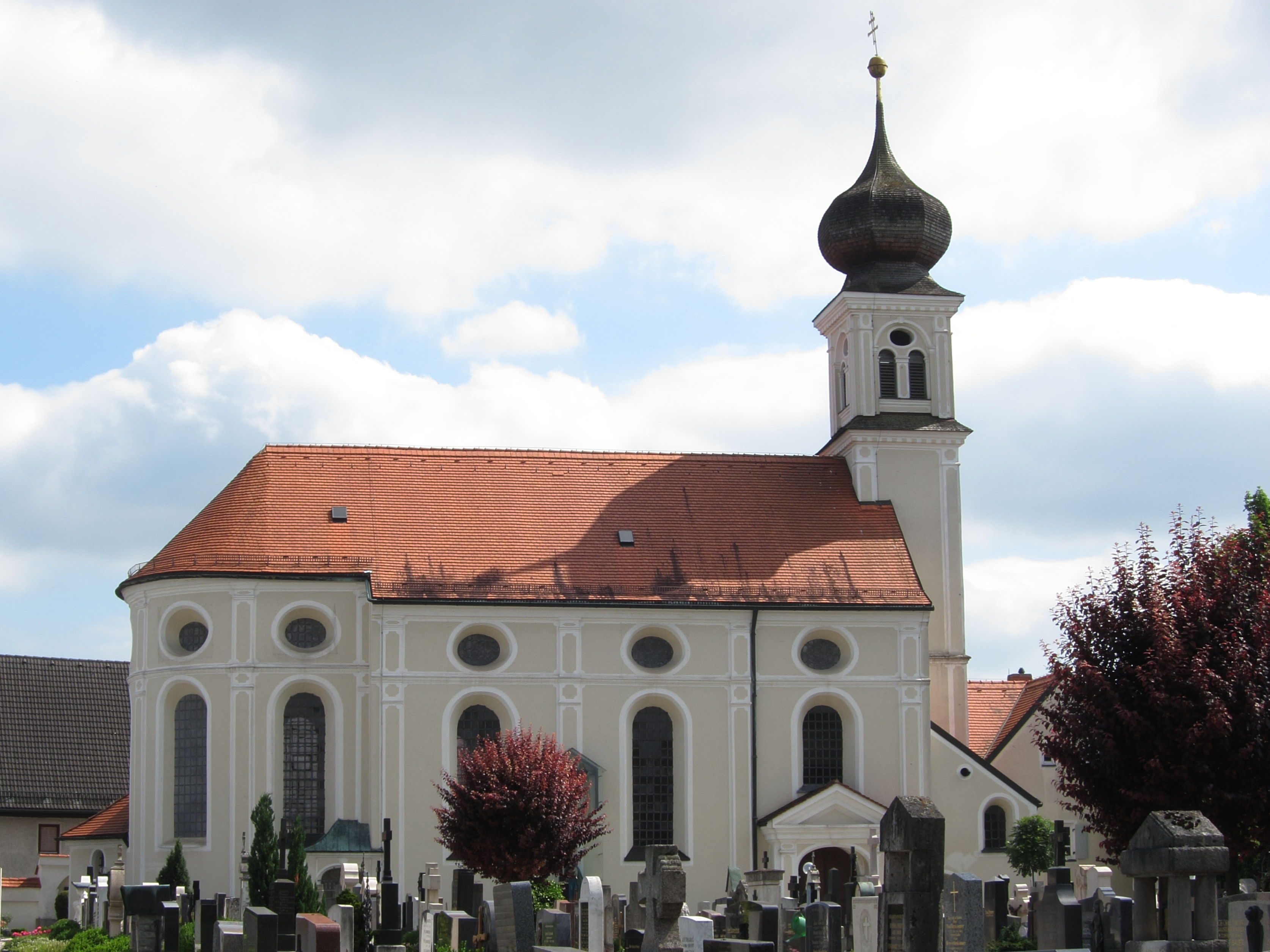 Sankt Paul 4; Friedhofskirche St. Paul, barocker Saalbau mit eingezogenem halbrundem Chor, von Hans Kogler, 1699; mit Ausstattung.